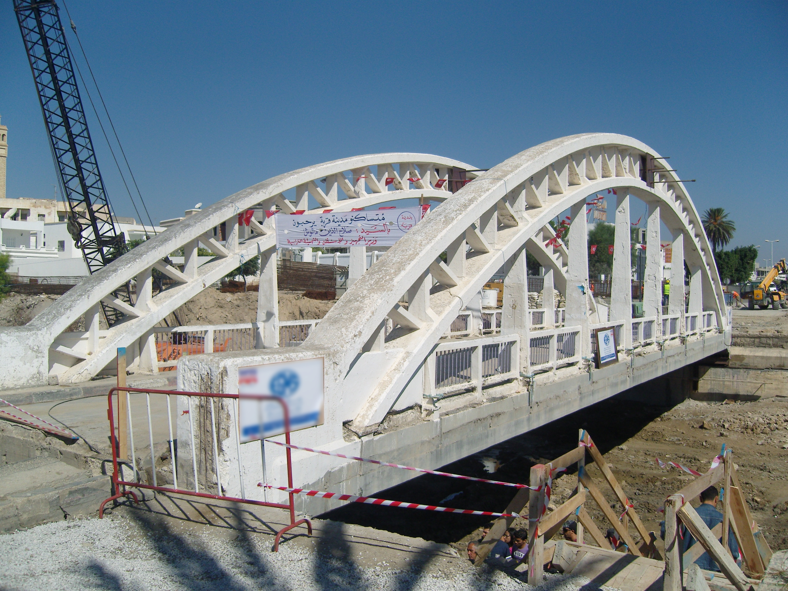 Pont en arc en béton armé datant de 1931 dans la ville de Korba en Tunisie. Pesant 663 t, il subit une opération de ripage par des vérins hydrauliques afin d'ériger un nouvel pont à poutres.